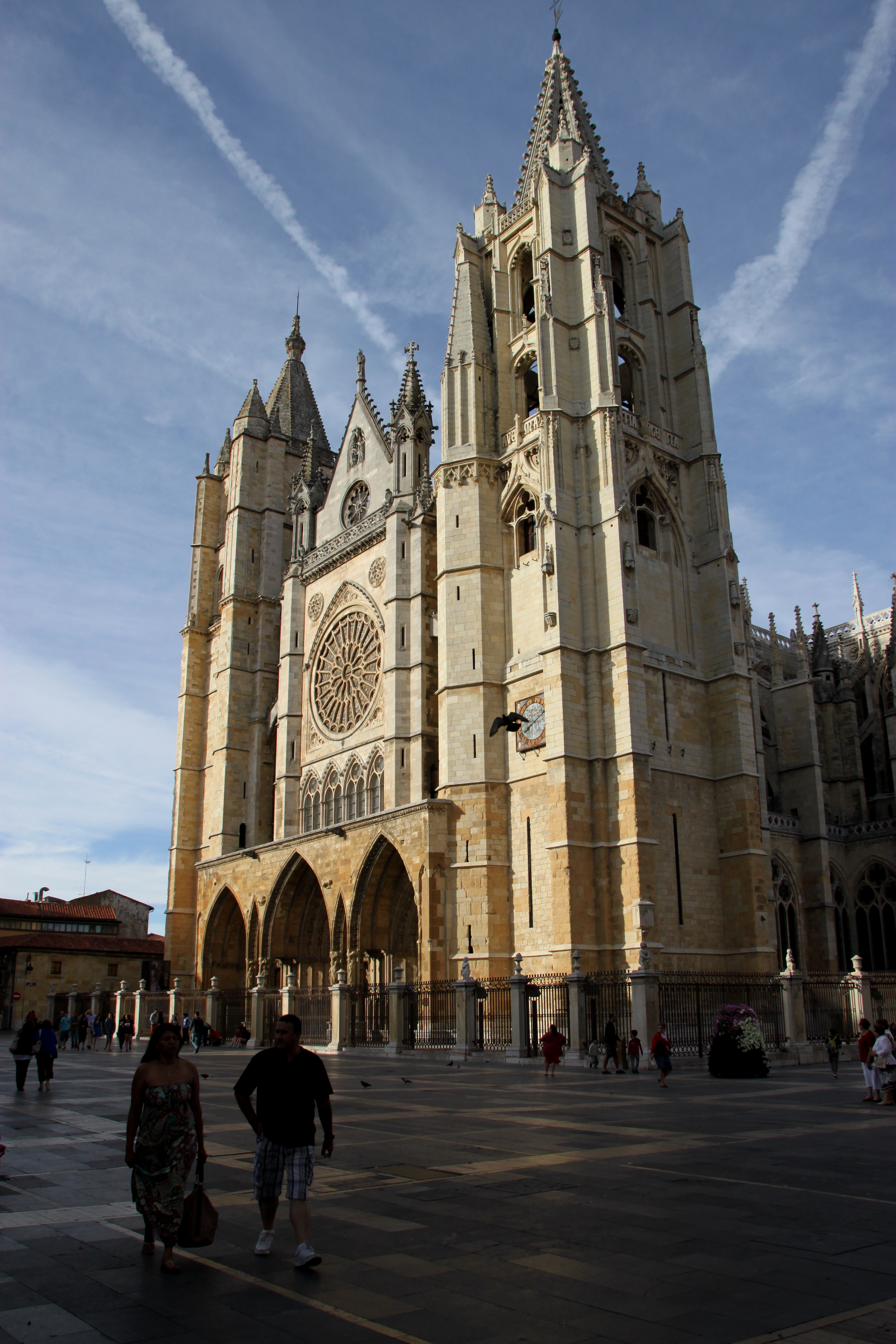 Pulchra Leonina. Catedral de León